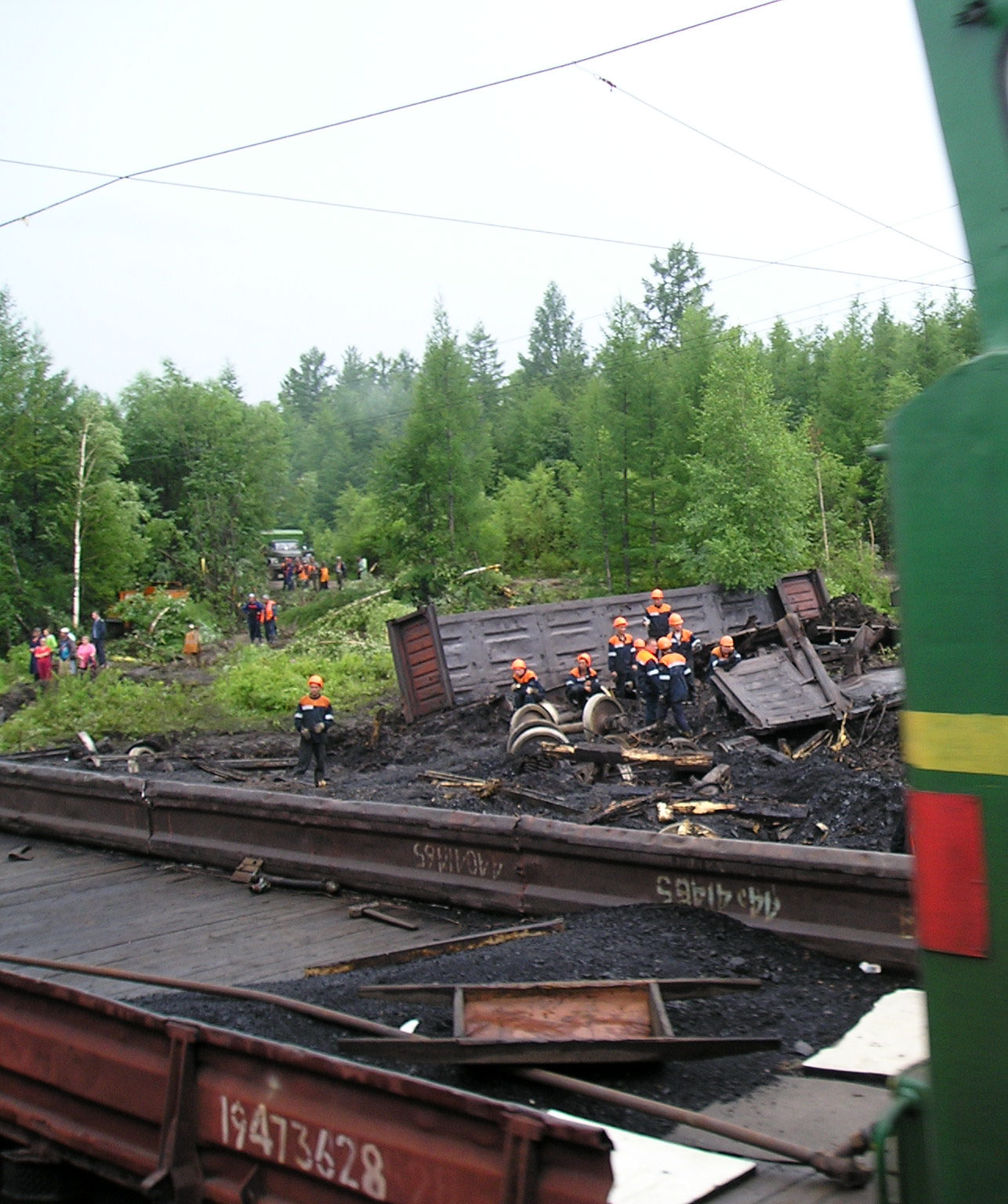 Устранени последствий схода 14 полувагонов с углём грузового поезда №2104 на перегоне Сгибеево-Уруша 11.07.2007